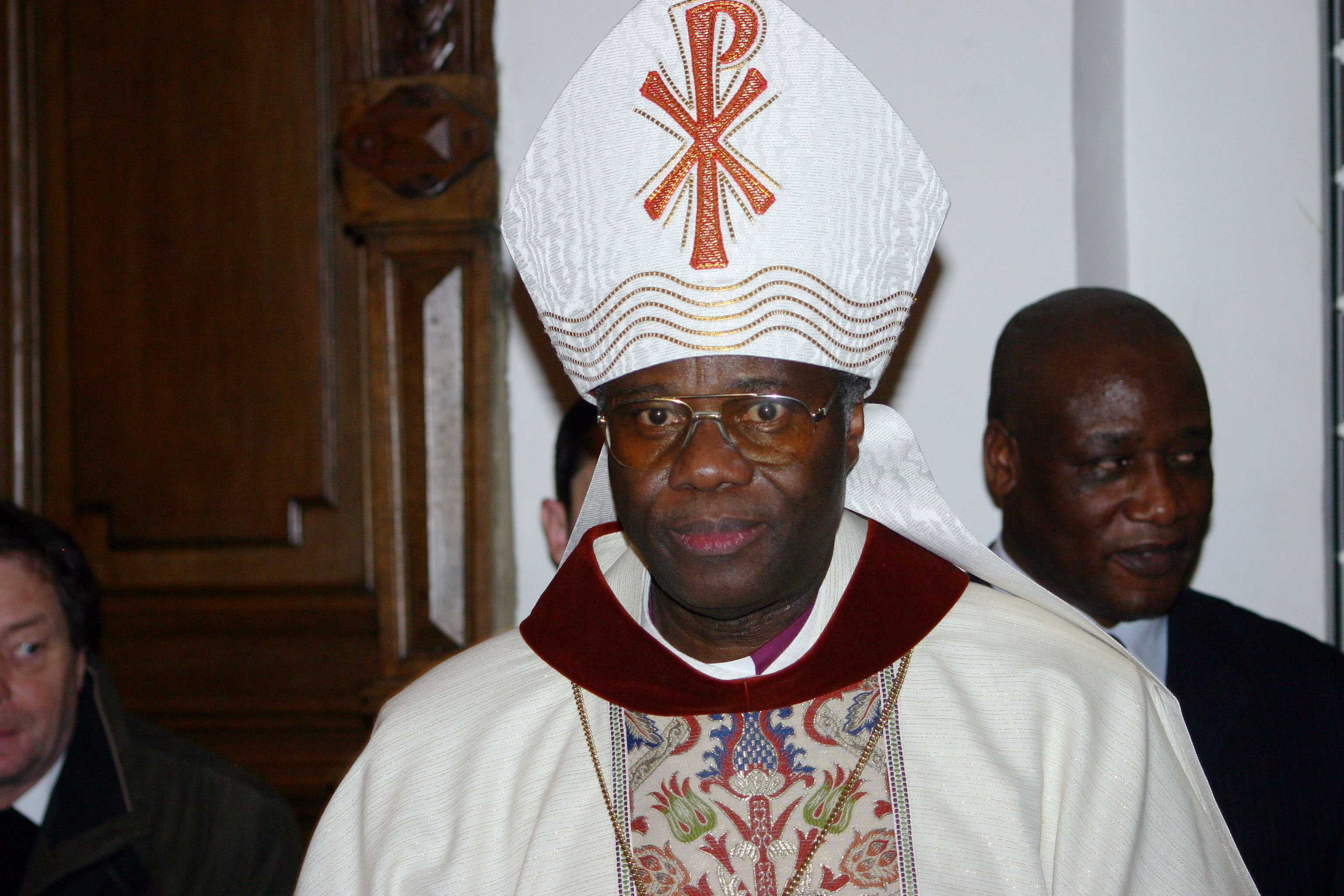 Mag.Dr. John Okoro, Bischof der Altkatholischen Kirche Österreich, bei seiner Weihe am 2. Februar 2008